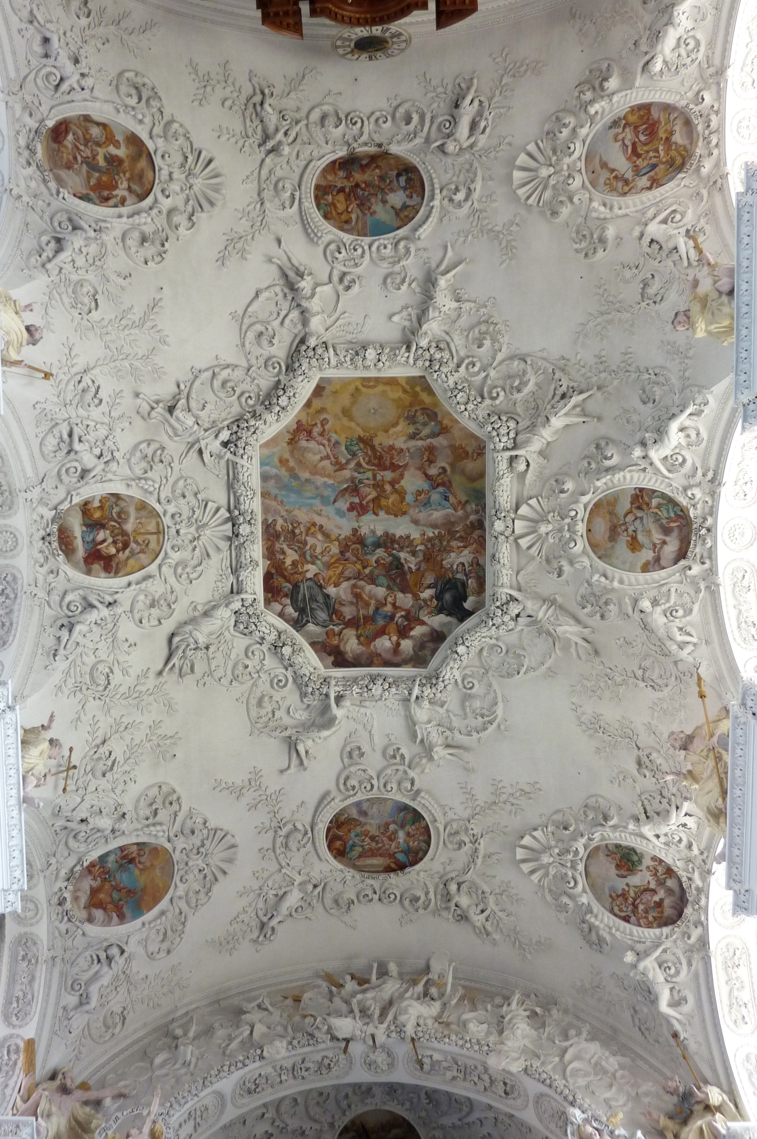 Kirche St. Johannes der Täufer des ehemaligen Benediktinerinnenklosters Kloster Holzen in Allmannshofen im Landkreis Augsburg (Bayern), Stuckdecke mit Fresken